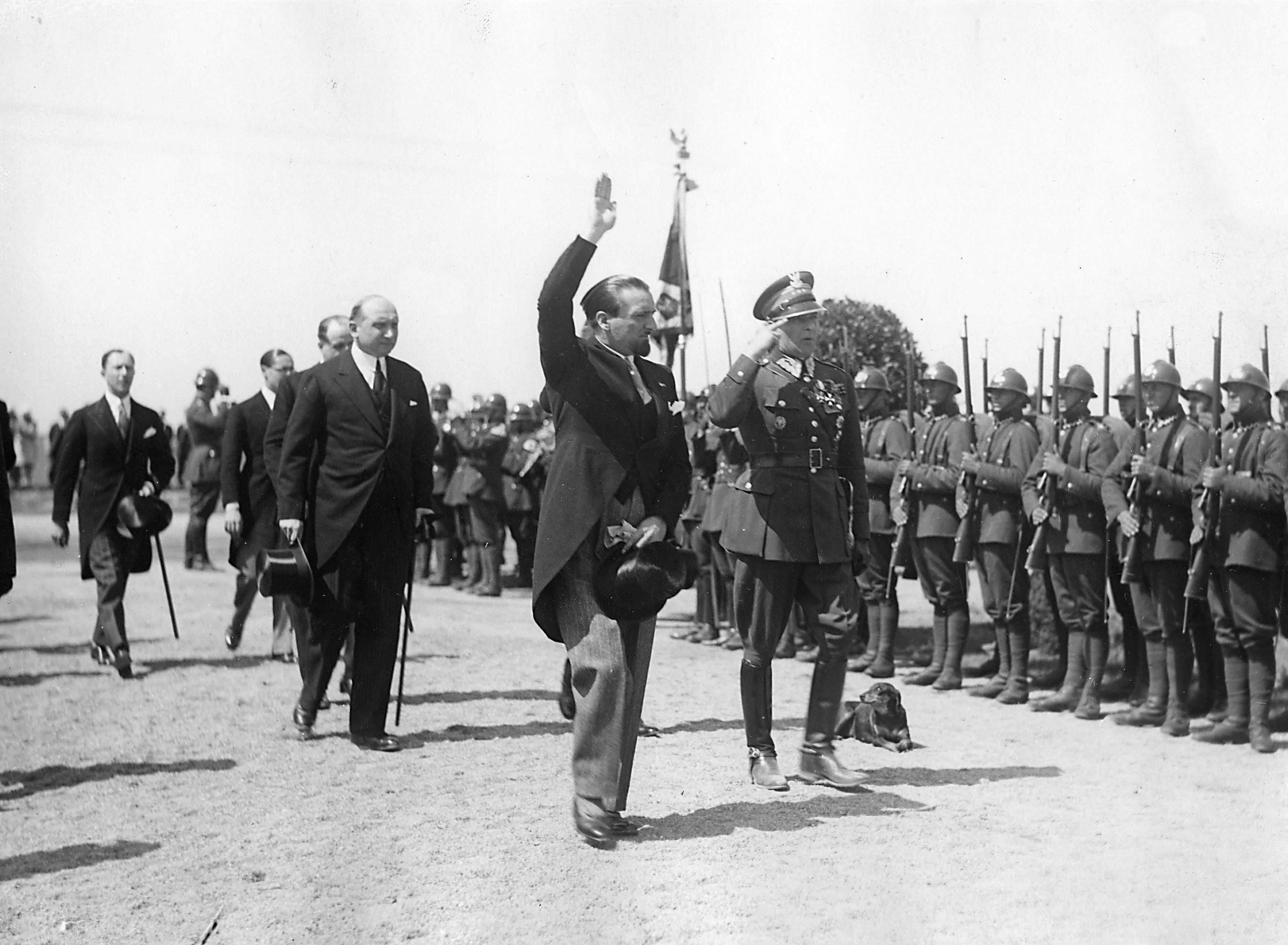 Uroczystość poświęcenia Cmentarza Żołnierzy Włoskich w Warszawie. Na zdjęciu są widoczni: Bolesław Ignacy Florian Długoszowski-Wieniawa, August Zaleski, Dino Grandi